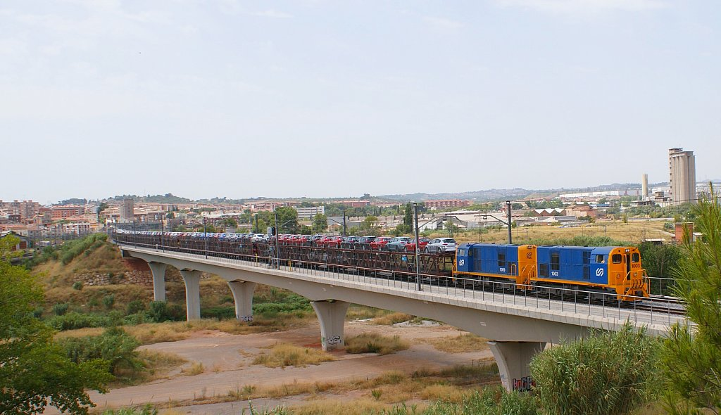 Dels 3 dies que he acompanyat a en ximiélgalu, oh! a fotografiar material dels FGC per terres catalanes, em va permetre fotografiar les "hawaianes" 1003-1009 amb l'autometro carregat de vehicles SEAT, al seu pas pel pont sobre el riu Llobregat en direcció el port de Barcelona. Agrair a Pol Llopart i la gent de FGC per l'informació que en moments puntuals m'han permès realitzar aquesta foto. De los 3 días que he acompañado a ximiélgalu, oh! a fotografiar material de los FGC por tierras catalanas, me permitió fotografiar las "hawaianas" 1003-1009 con el autometro cargado de vehículos SEAT, a su paso por el puente sobre el río Llobregat en dirección el puerto de Barcelona. Agradecer a Pol Llopart y a la gente de FGC por la información que en momentos puntuales me han permitido realizar esta foto.